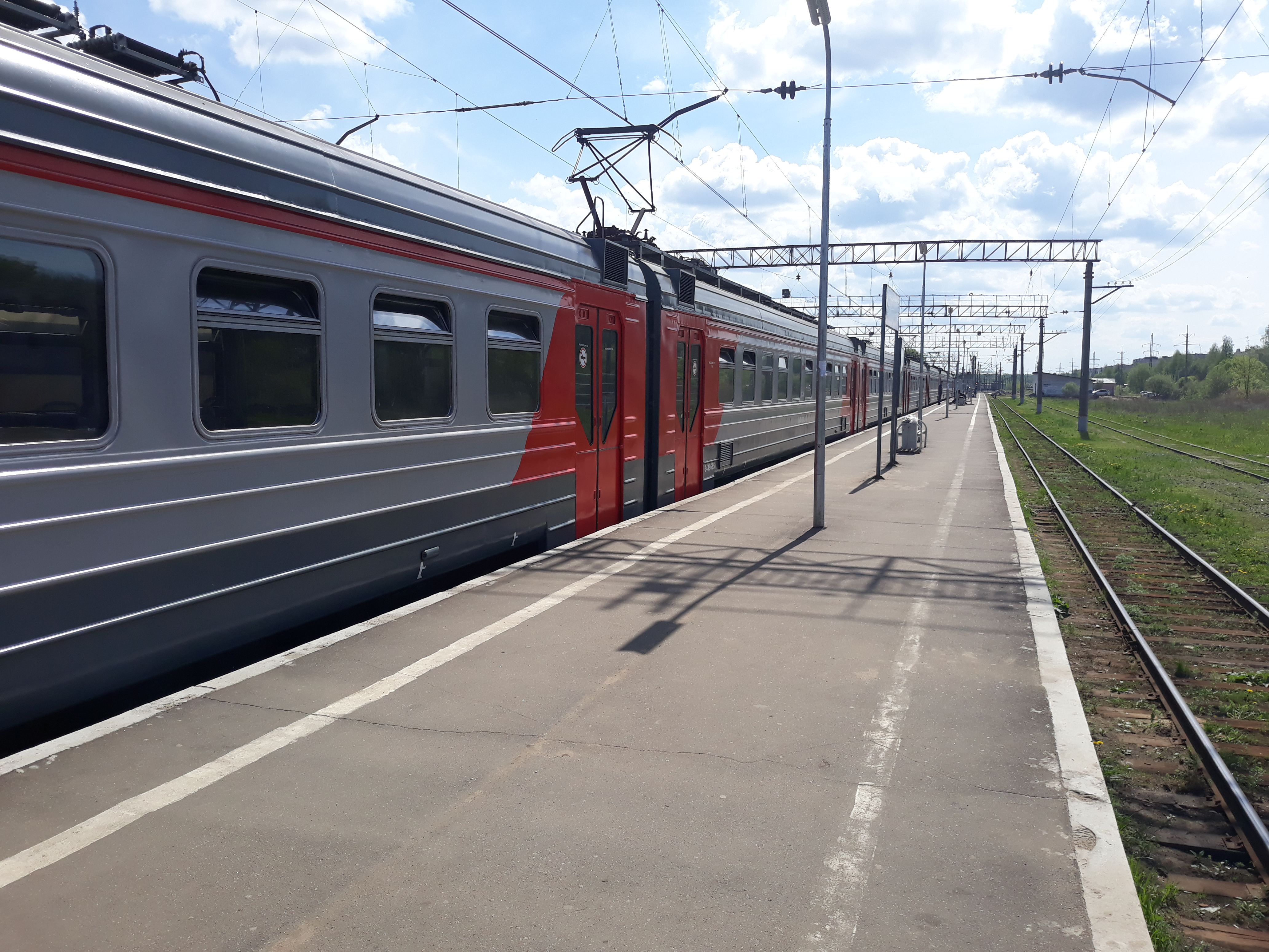 Станция «Савёлово», город Кимры, Тверская область